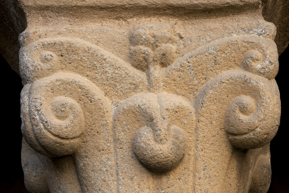 unidentified Spain